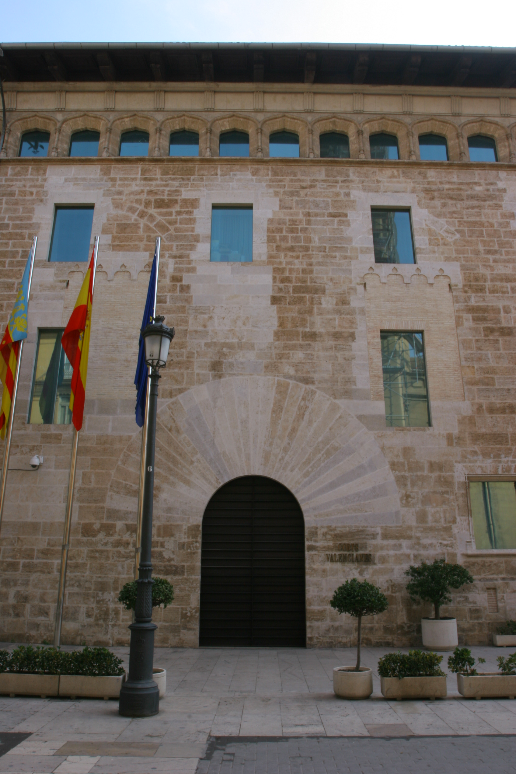 Entrada principal de Les Corts de la Comunitat Valenciana.